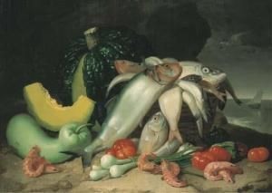 Naturaleza muerte con pescados.